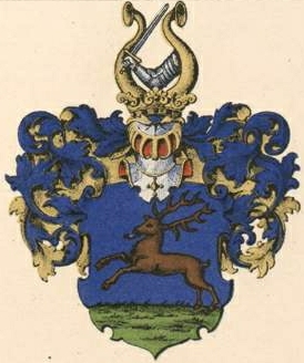 Frieselli suguvõsa aadlivapp